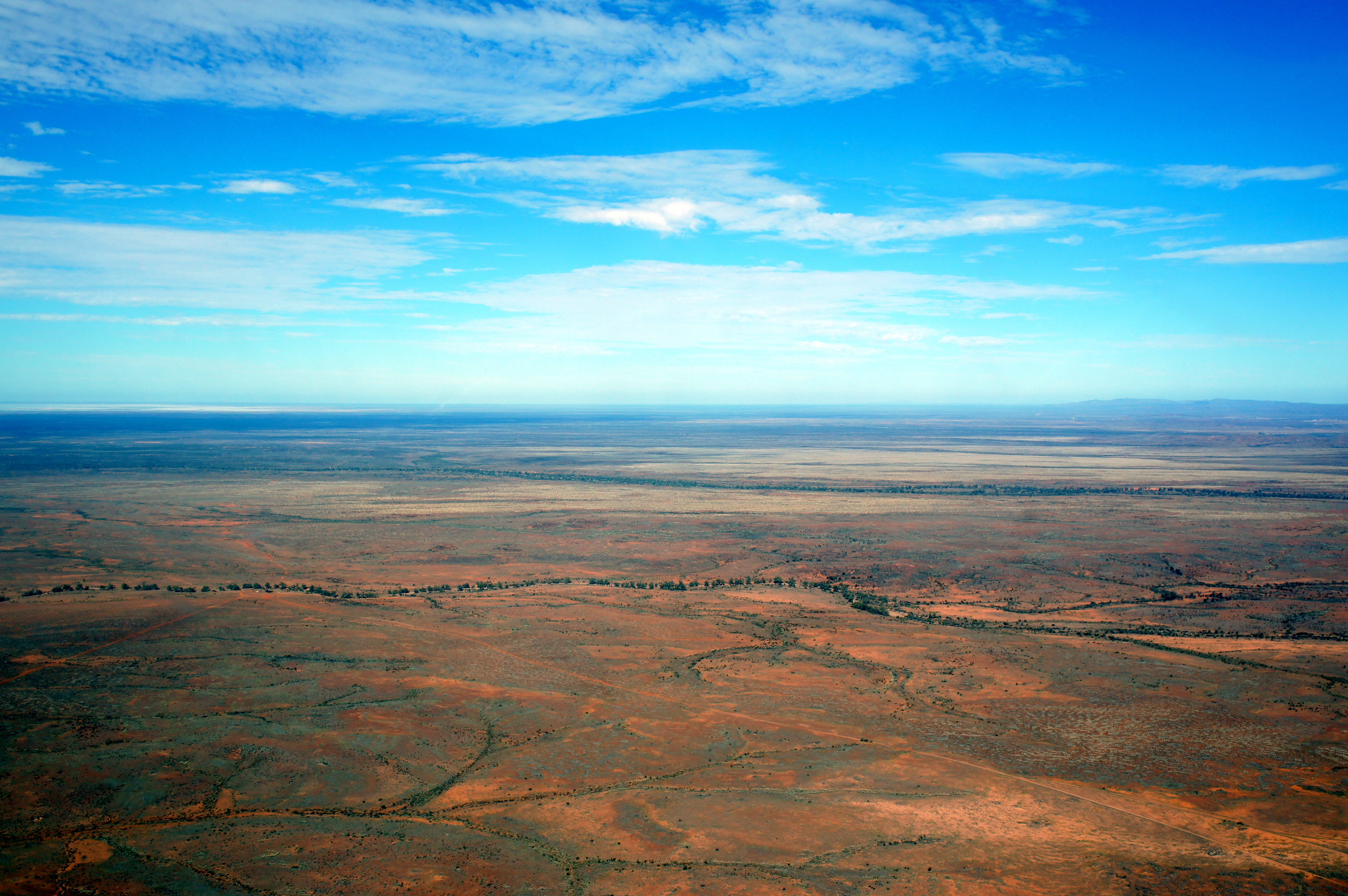 Strezlecki Desert SA